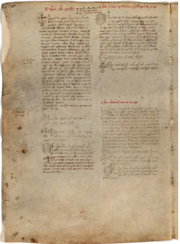 Pagina del Codex Wangianus, opere e atti del vescovo di Trento Federico Vanga, in cui per la prima volta, si cita il Castello di Ossana.